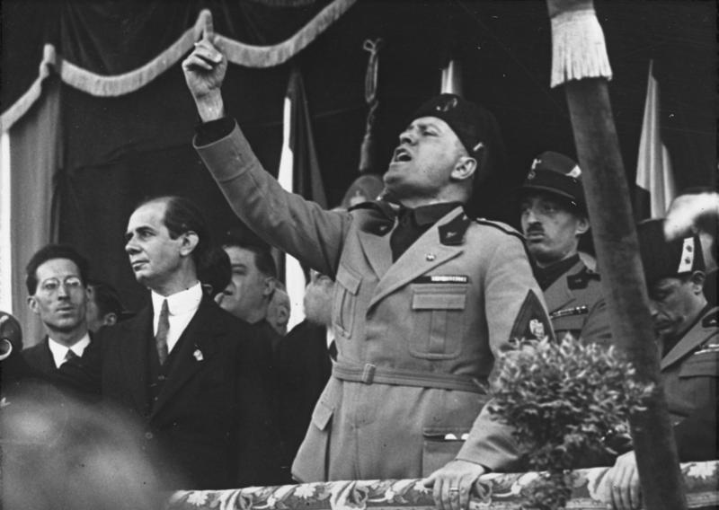 Die grosse politische Rede Mussolinis in Mailand ! Die grosse rednerische Geste des italienischen Diktators während seiner grossen politischen Rede von der Tribüne auf dem Domplatz in Mailand. Information added by Wikimedia users.*